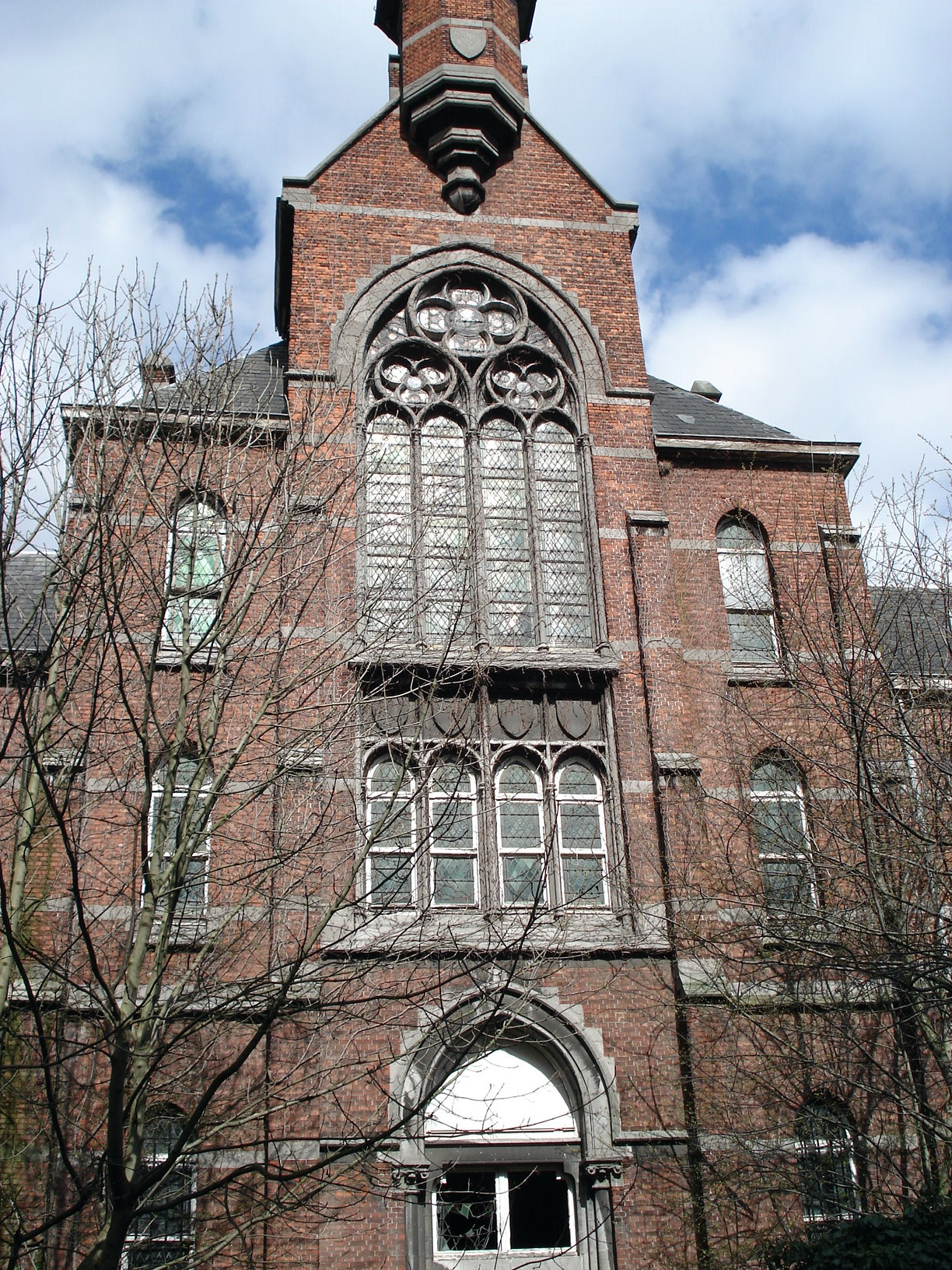 Franciscanessenklooster, Lange Kongostraat, te Antwerpen. Arch. Jules Bilmeyer.